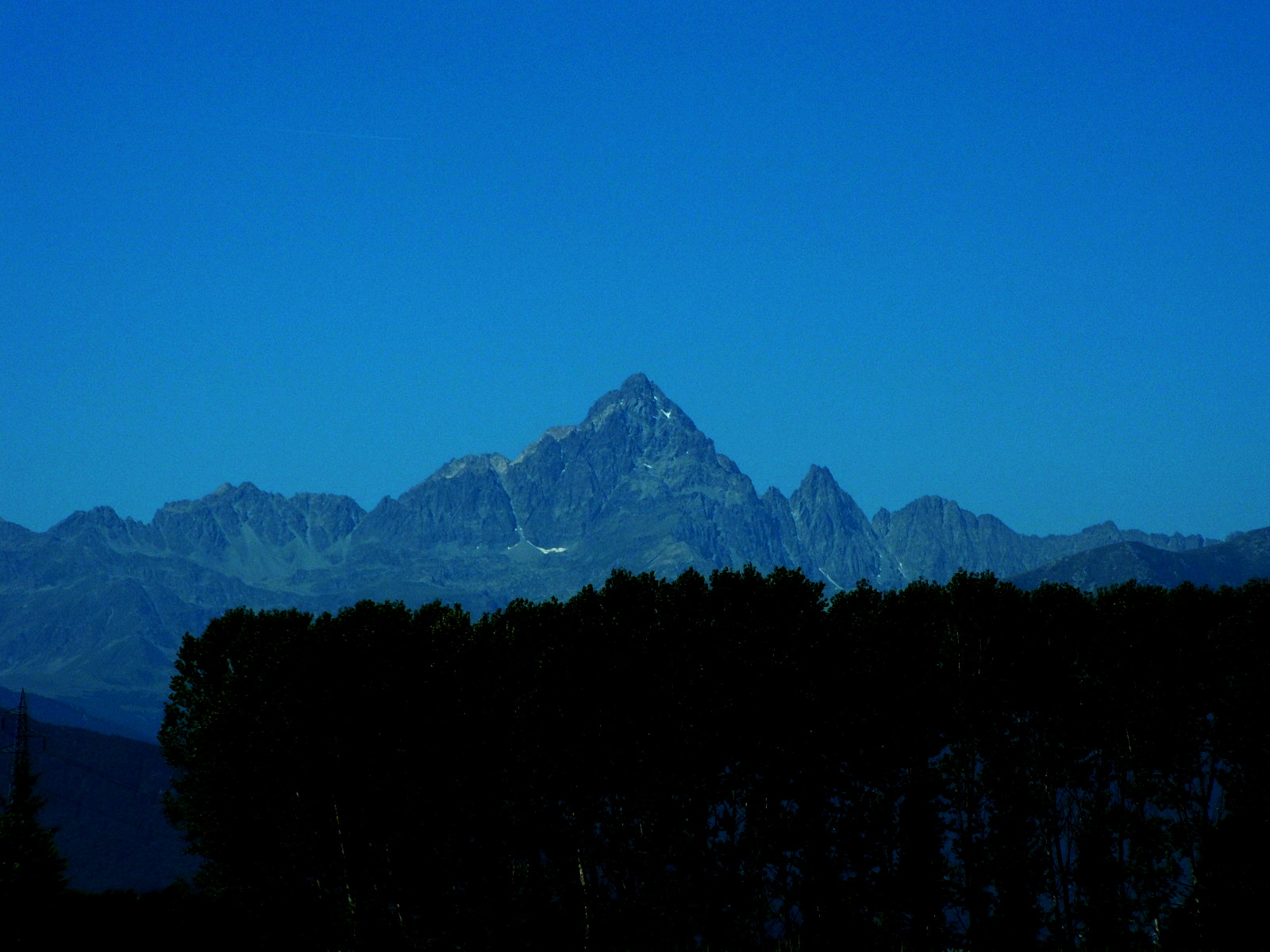 Il Monviso fotografato dalla piana piemontese, sulla strada in direzione di Barge presso Saluzzo.